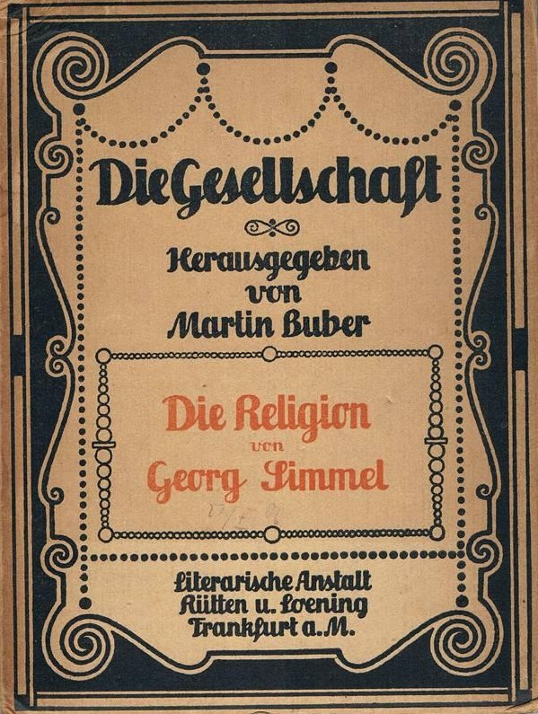 Georg Simmel: Die Religion. Frankfurt am Main, Literarische Anstalt Rütten & Loening, 1906 (Band 25 der von Martin Buber herausgegebenen Reihe "Die Gesellschaft. Sammlung sozialpsychologischer Monographien")